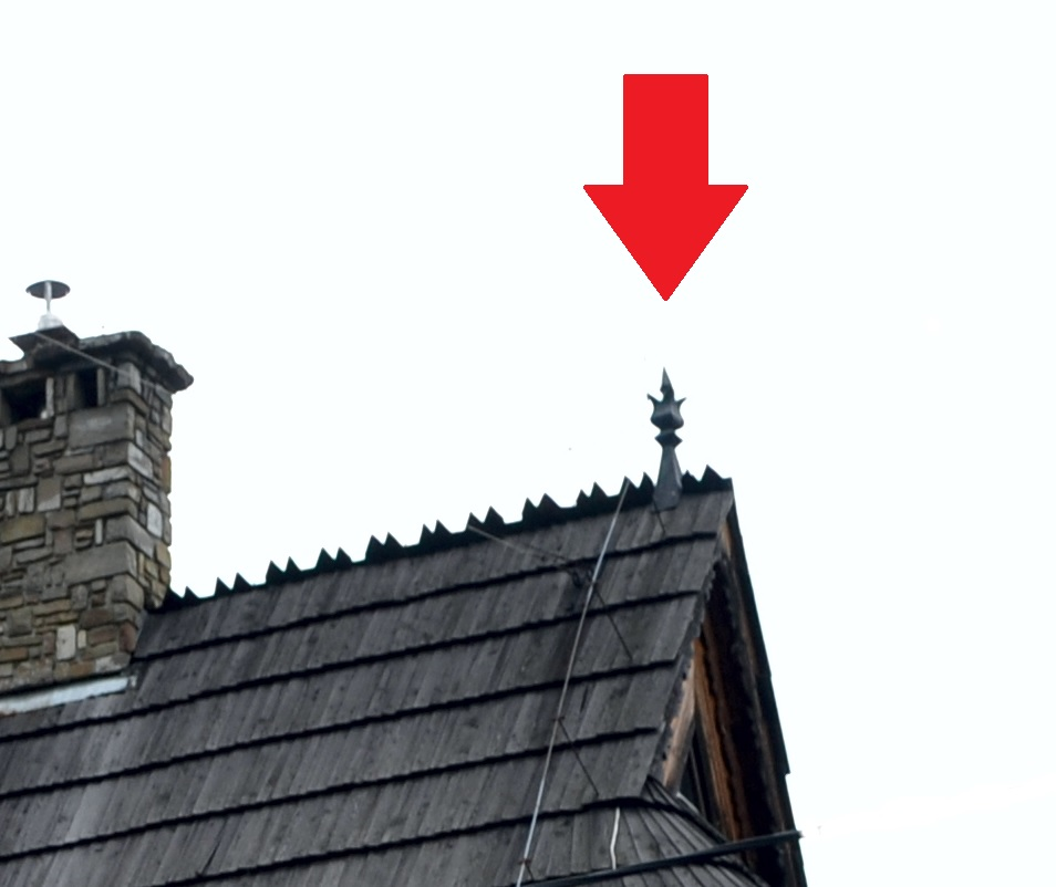 Bukowina Tatrzańska dach z pazdurem